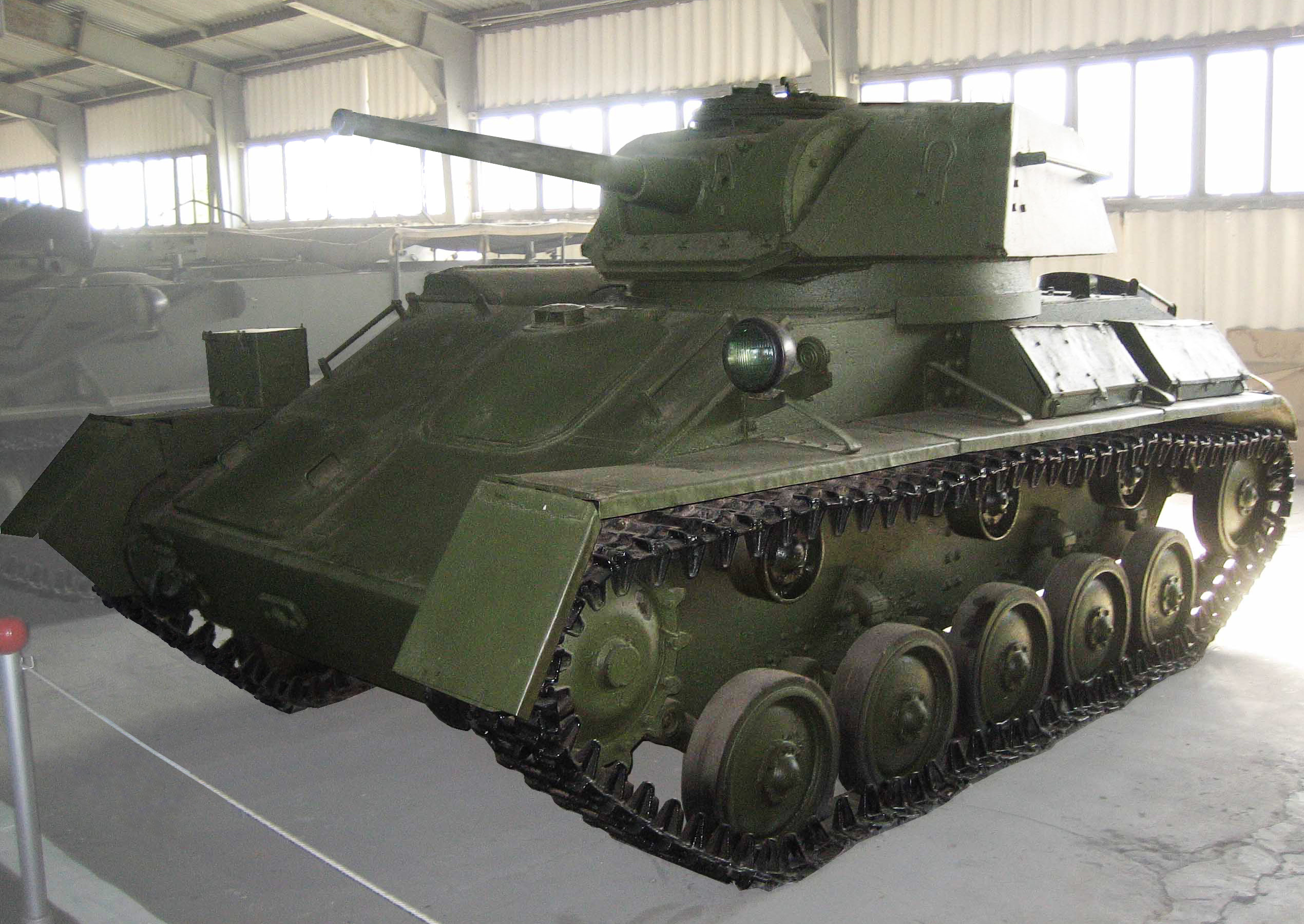 Т-80 в бронетанковом музее в Кубинке.